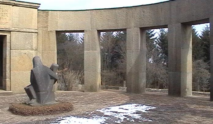 Ehrenfriedhof Daleiden, Landkreis Bitburg-Prüm.